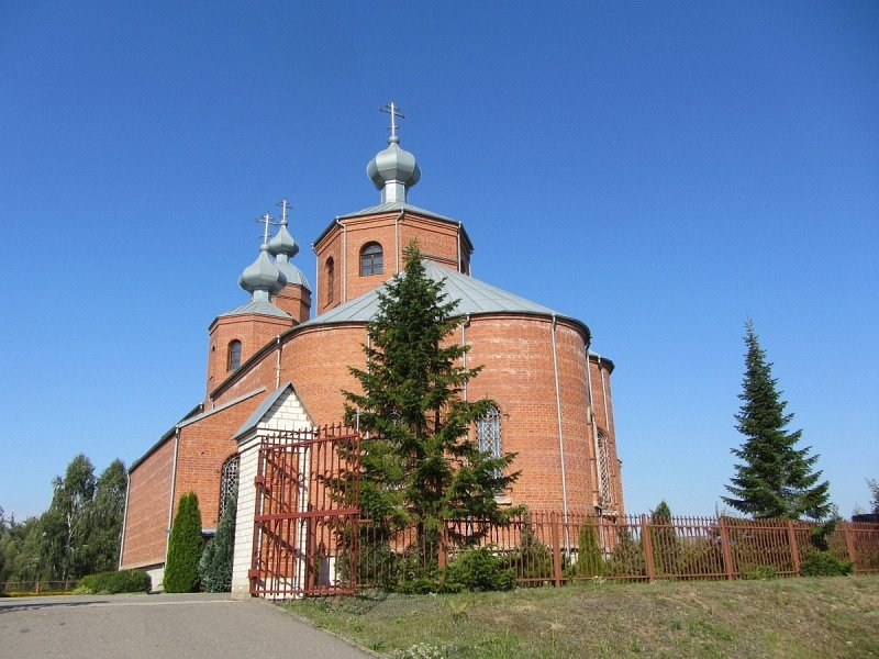 Парк. Ражанка Масты. Царква